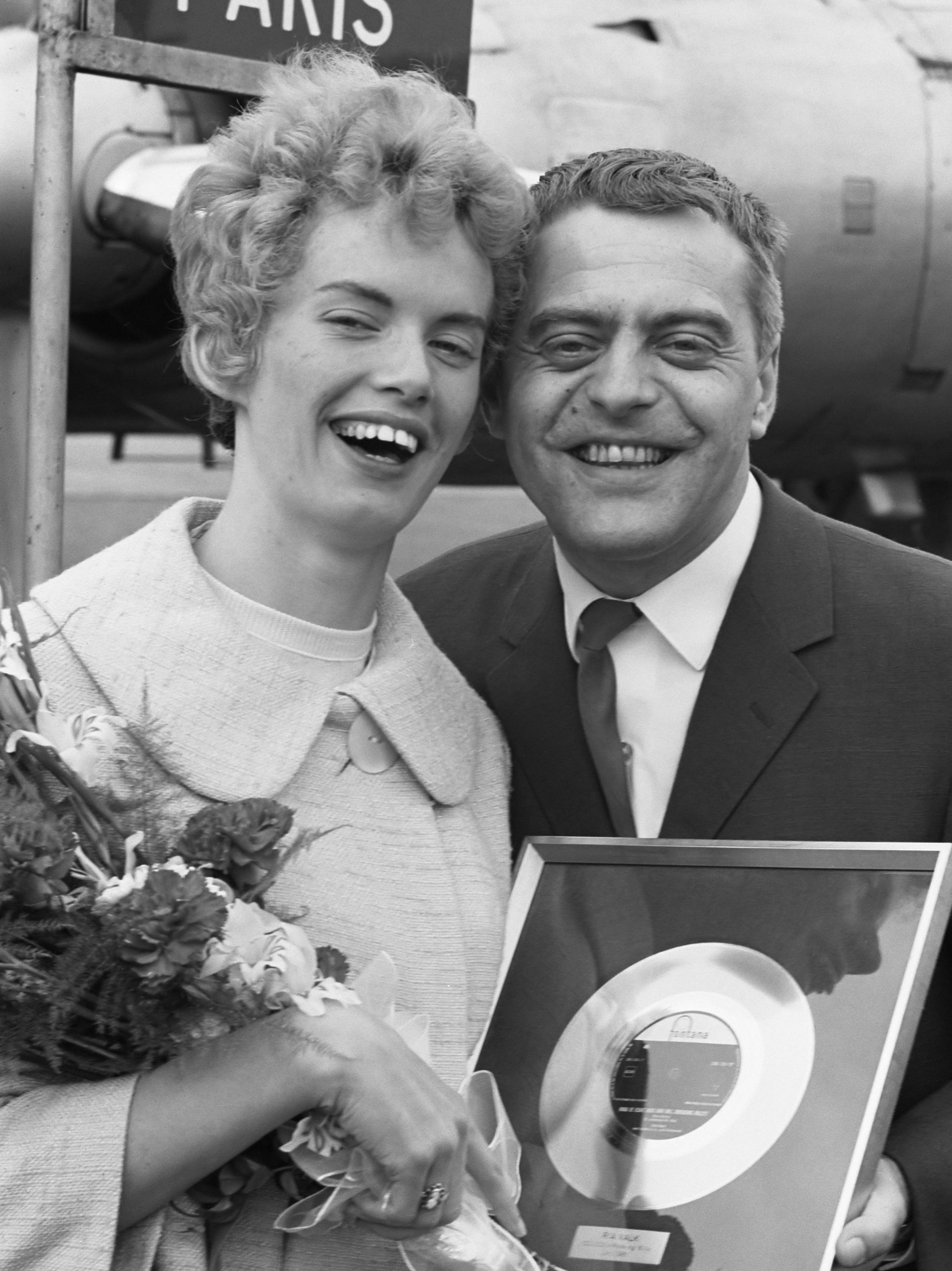 Aankomst Ria Valk op Schiphol. Ria Valk en Stig Anderson 8 juni 1961